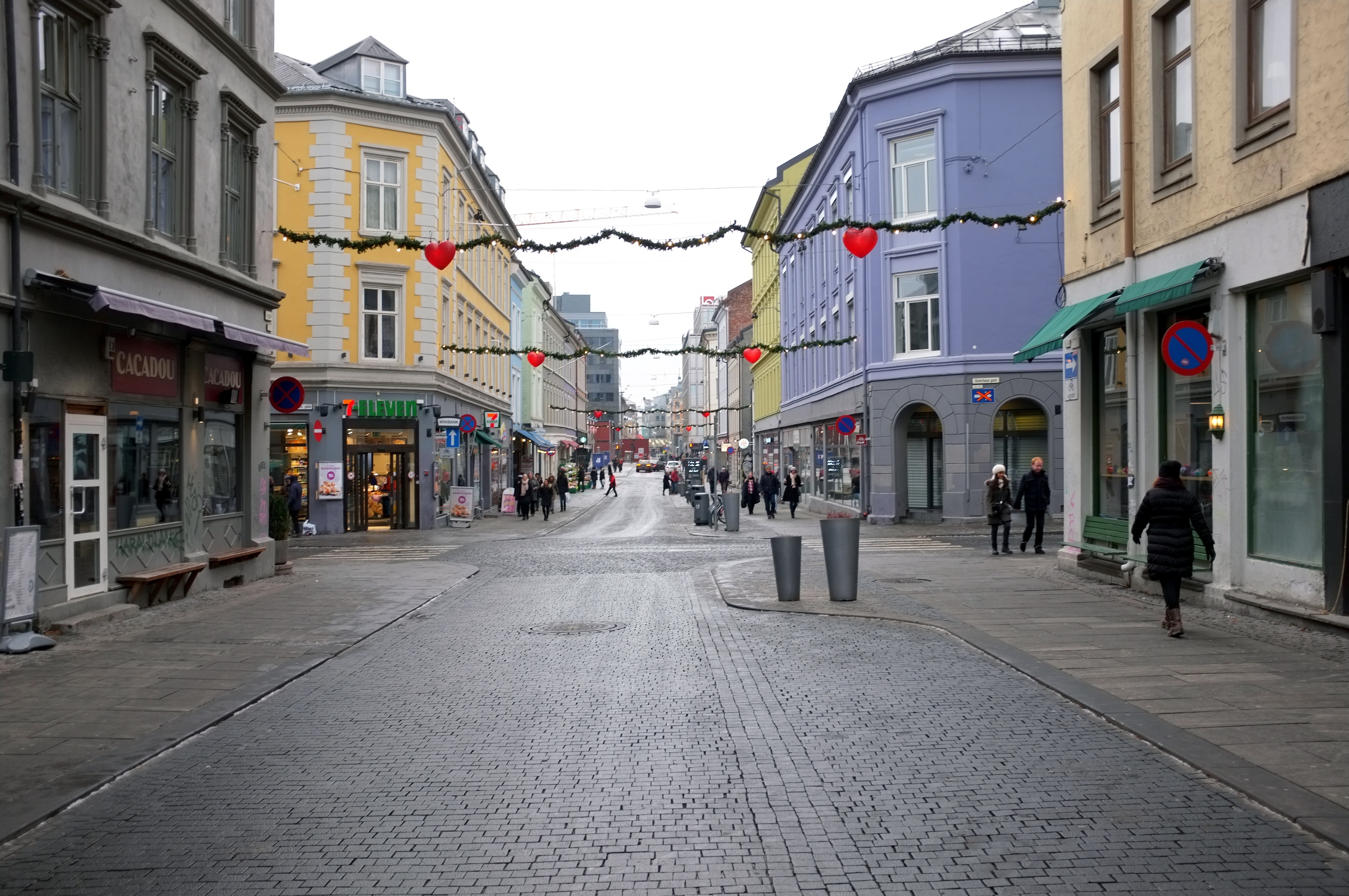 Torggata i Oslo.